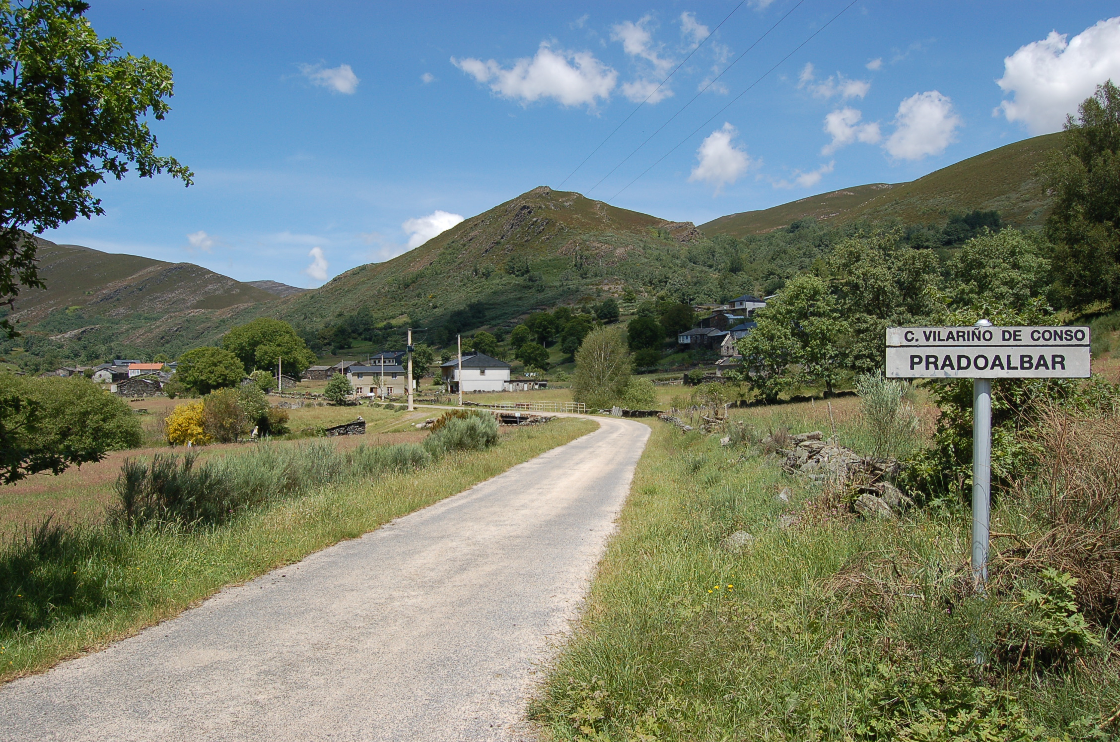 Vista de Pradoalbar (Vilariño de Conso)